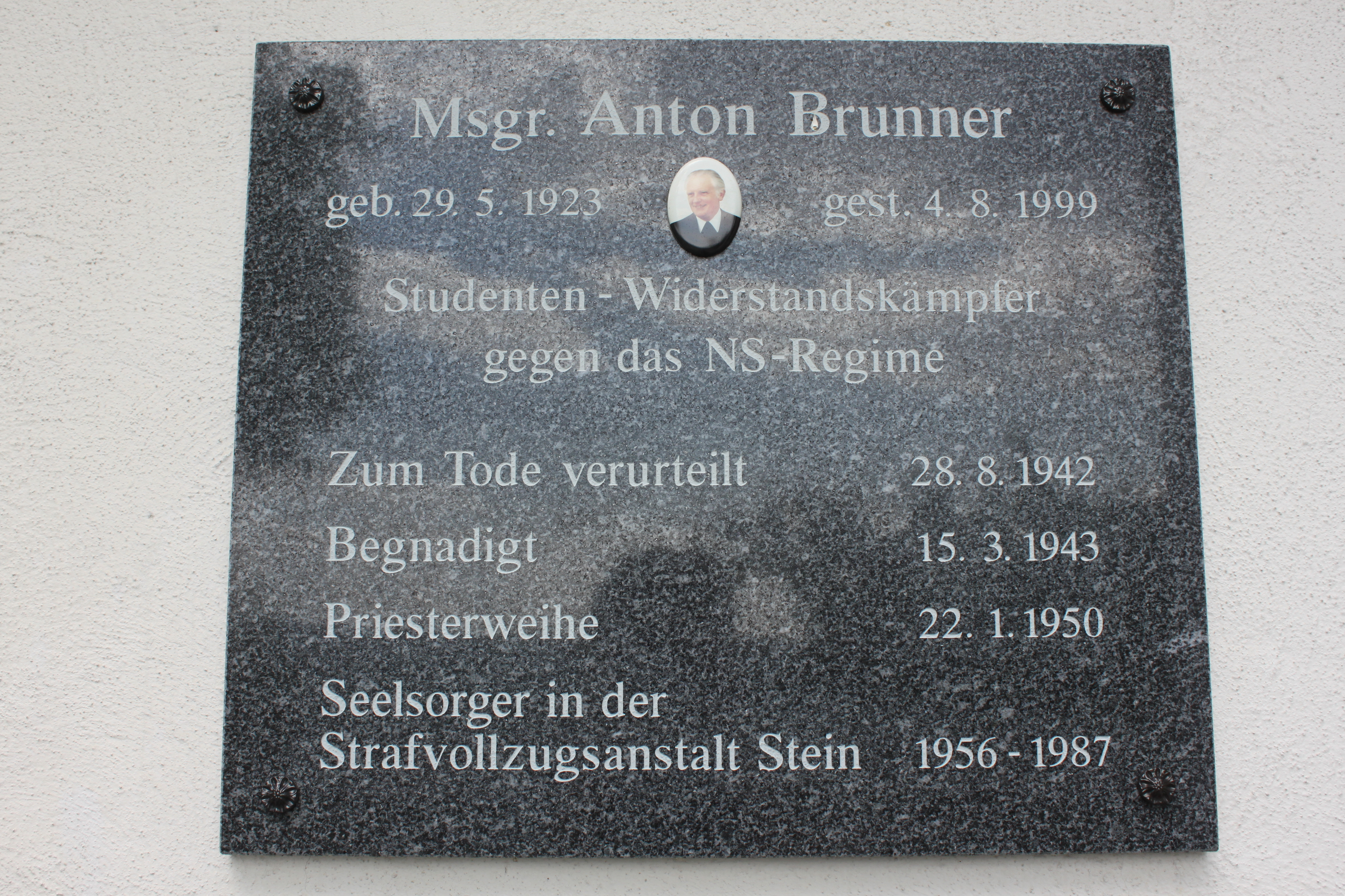 Gedenktafel bei der Einsegnungskapelle Emmersdorf, für den Priester Anton Brunner (1923-1999), Widerstandkämpfer als Student gegen das NS-Regime, Gefangenenseelsorger in der Justizanstalt Stein (1956-1987)